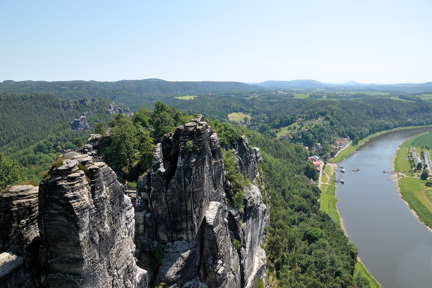 Sächsische Schweiz – Elbsandsteingebirge – Blick an den Basteifelsen vorbei elbaufwärts nach Niederrathen und Rathen